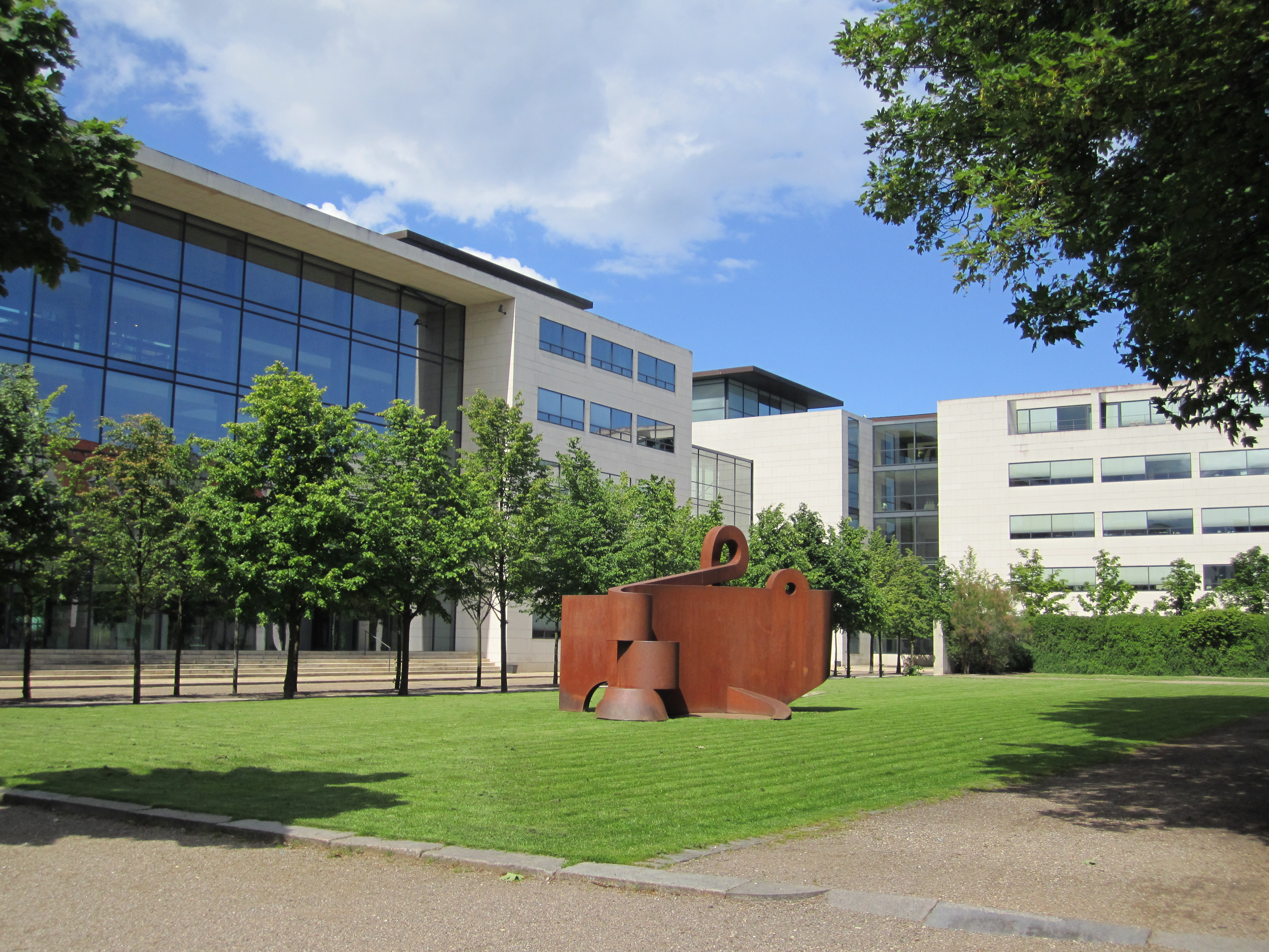 Park, Nicolai Eigtveds Gade, Christiansbro, Christianshavn, Copenhagen, Denmark